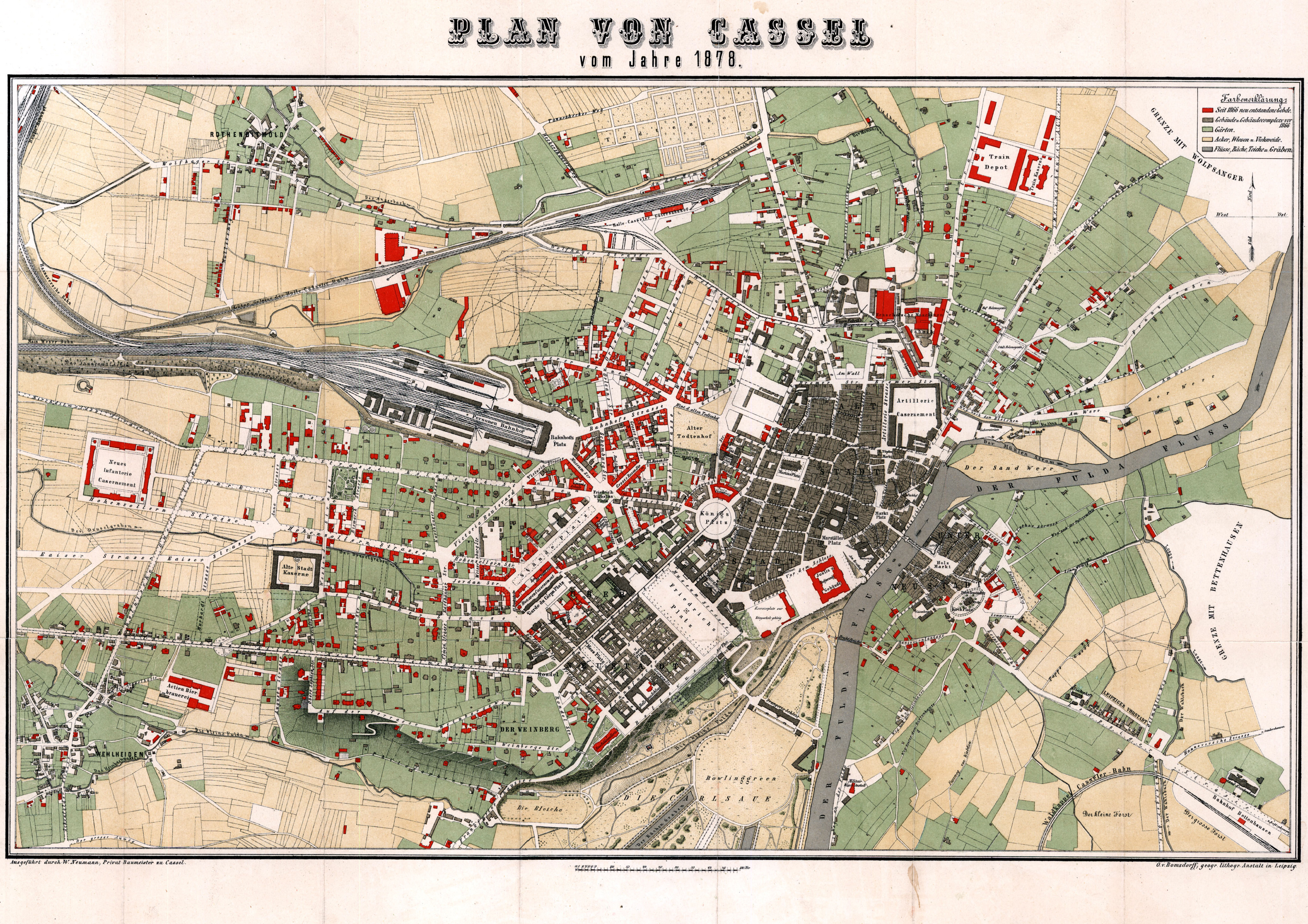 Der Neumann-Plan zeigt als Bestandsplan die Situation Kassels in der zweiten Hälfte des 19. Jahrhunderts